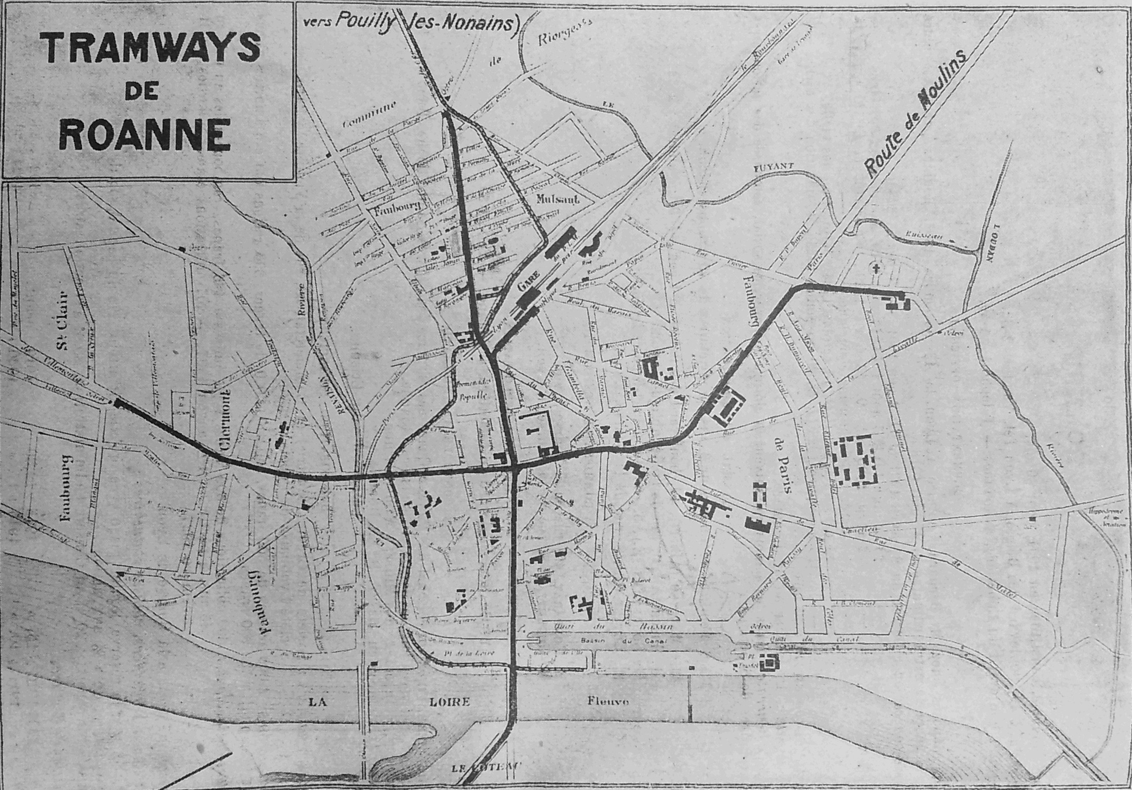 Plan du réseau de tramway de Roanne, éditée par l'Annuaire des Chemins de fer et des Tramways (ancien Marchal) : Édition des réseaux français, Paris, 1928, 43e éd., 1334 p.